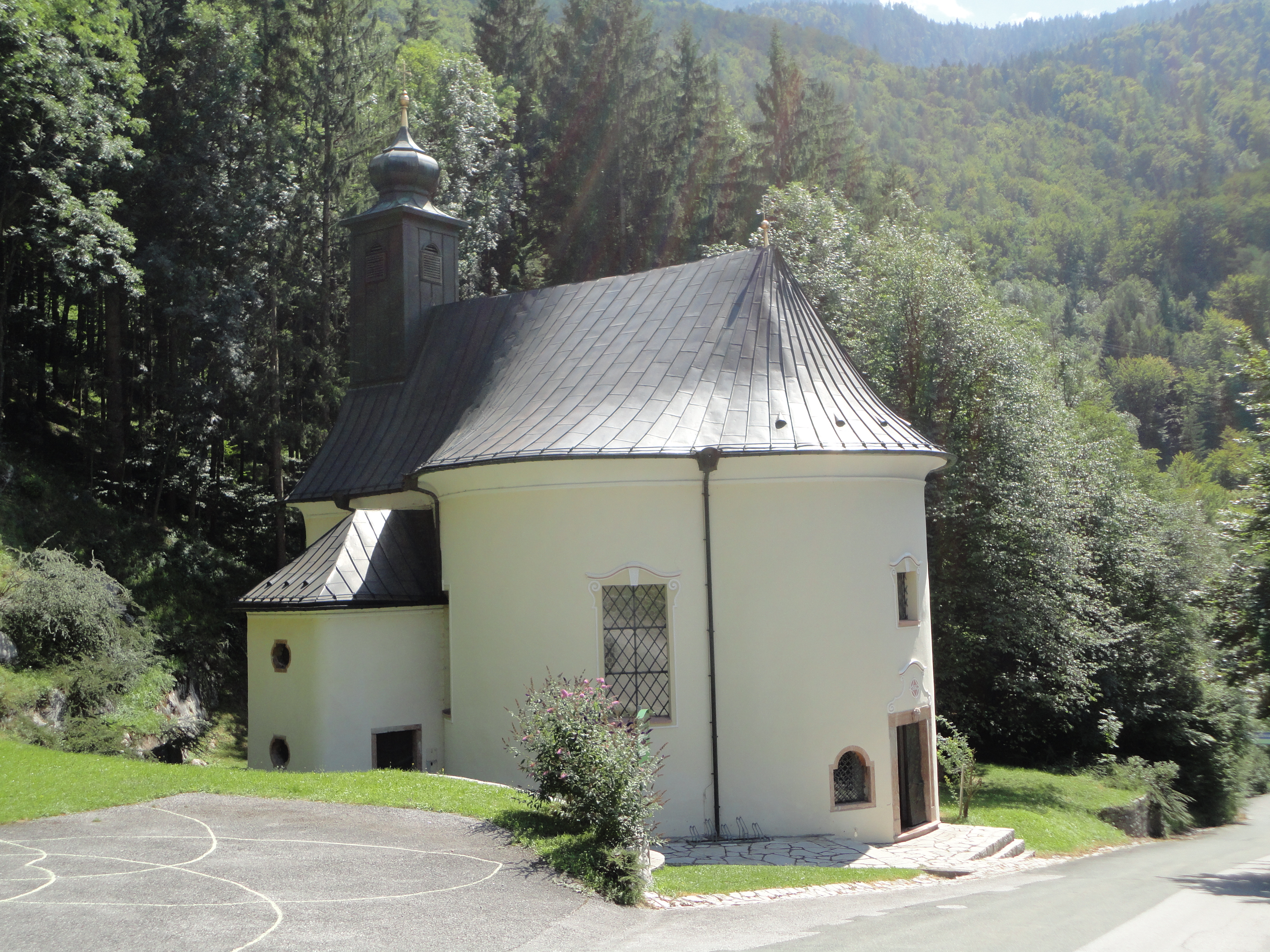 Kath. Filialkirche Maria Bruneck